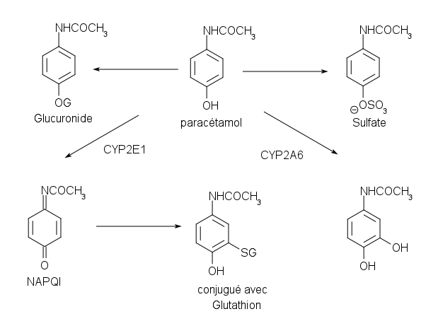 metabolisme simplifié du paracétamol